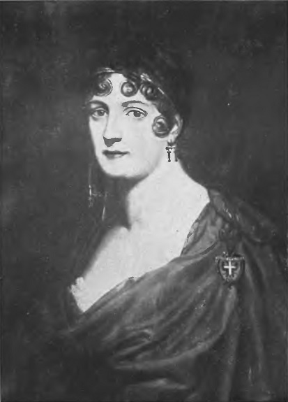 Łucja z Lubomirskich Tyszkiewiczowa